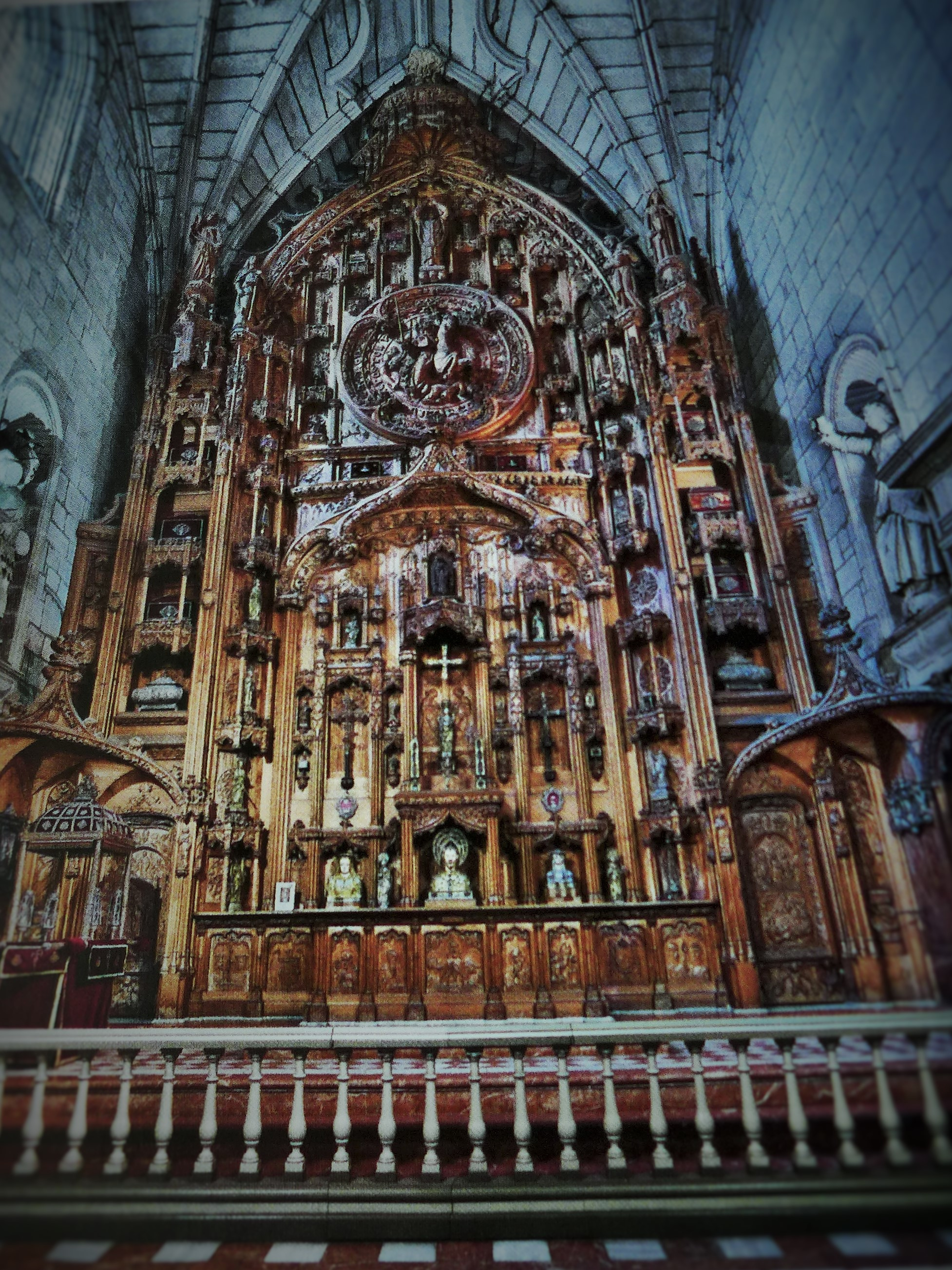 Santiago de Compostela-i katedrális mellékszentélye retablóval